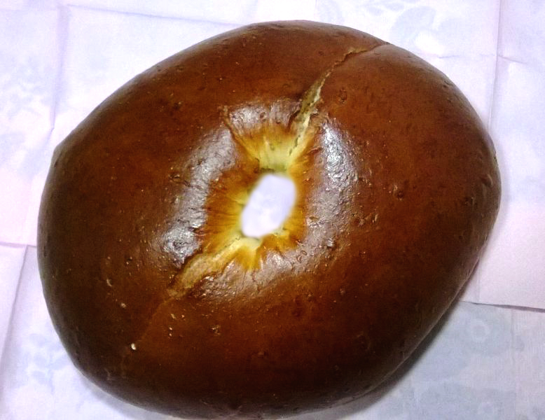 Il “Biscotto di San Giovenale è un dolce che ancora oggi si prepara in occasione della festa del Patrono San Giovenale, da cui prende il nome.